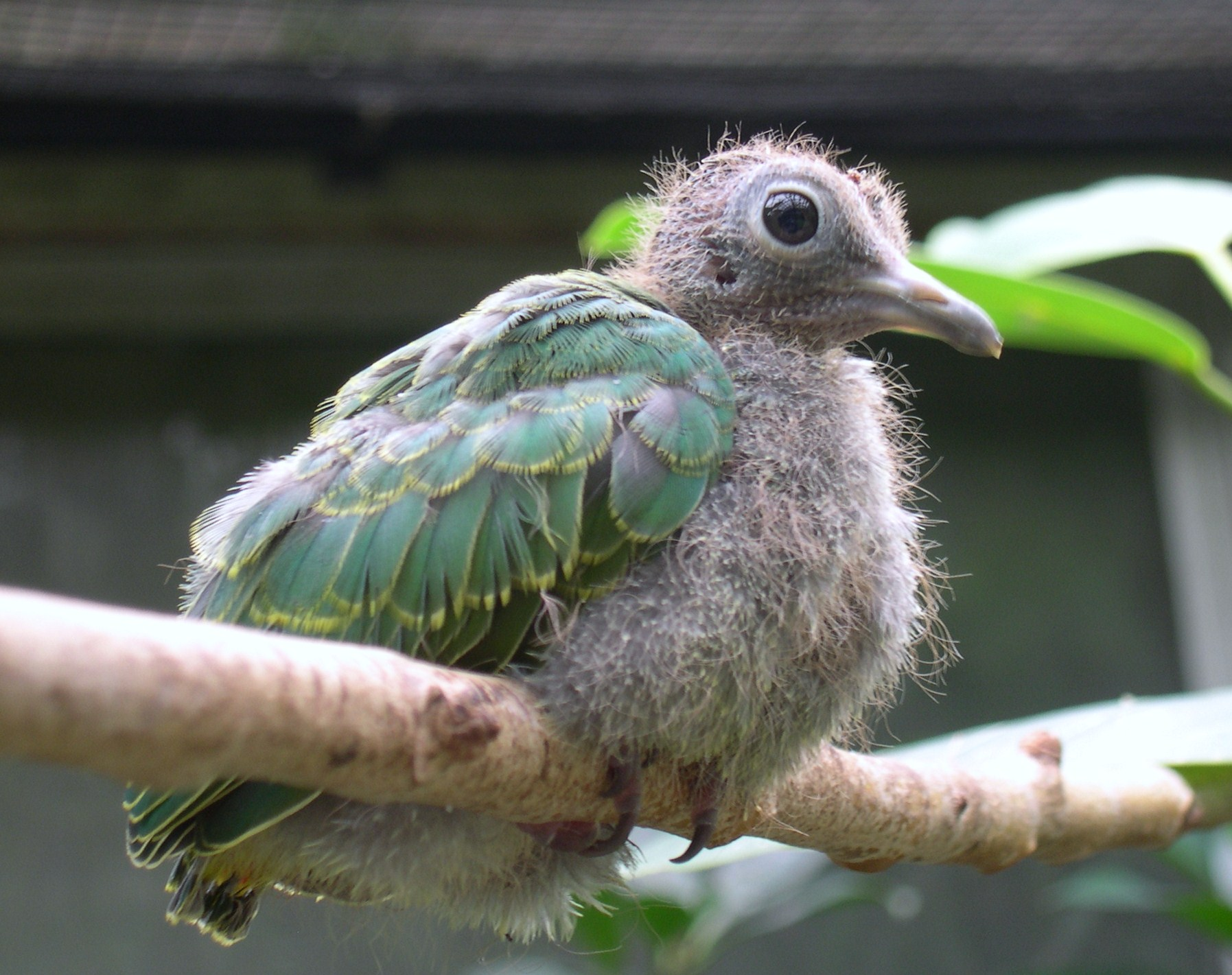 A juvenile black-naped Fruit-dove (Ptilinopus melanospilus)